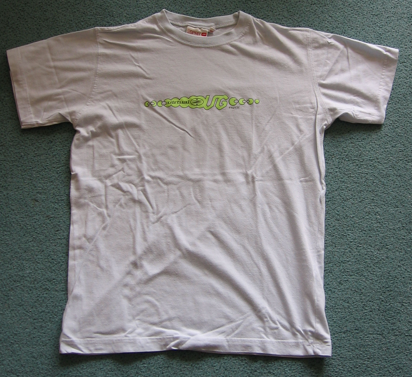 T-shirt